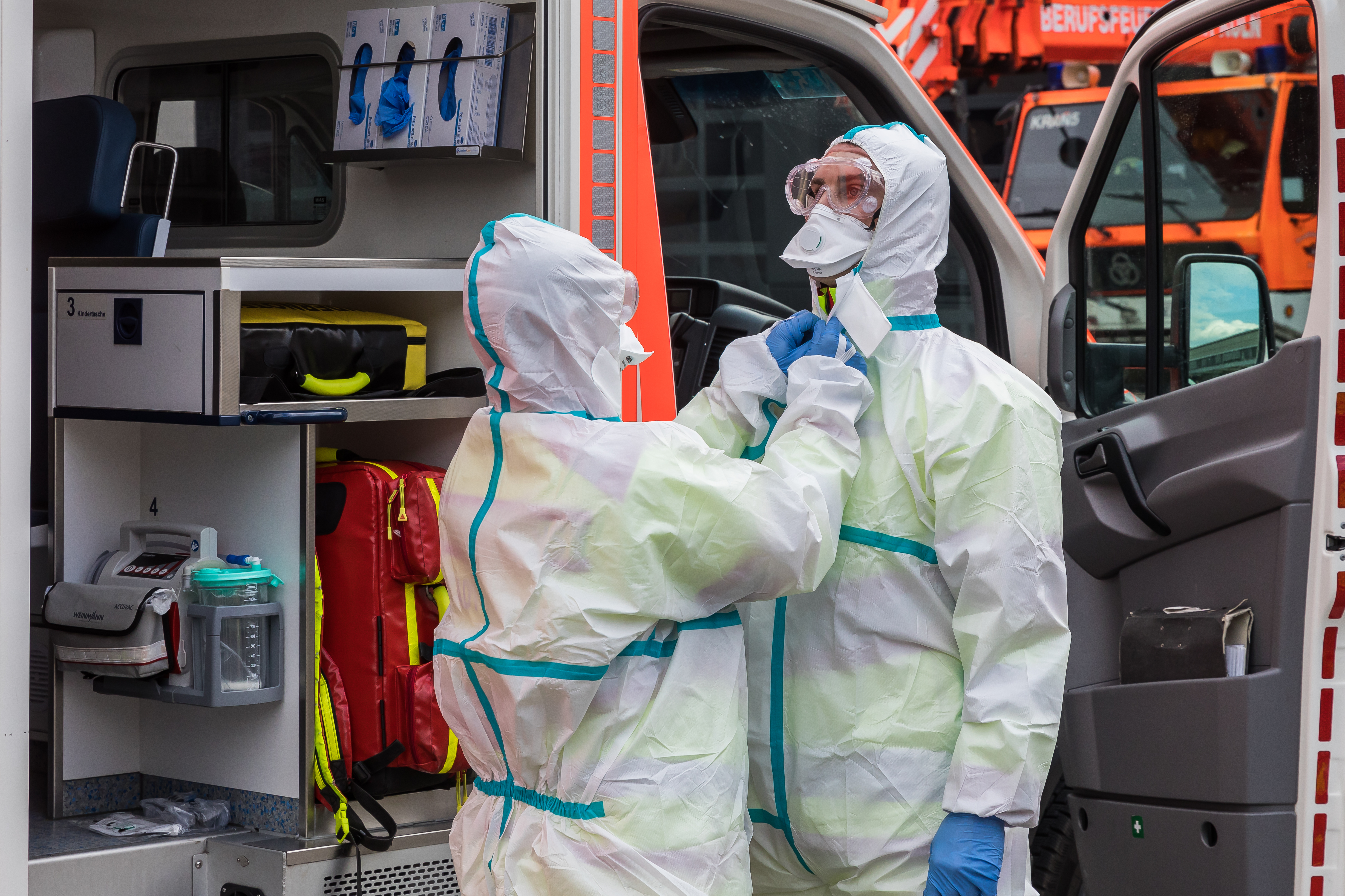 Rettungsdienst der Stadt Köln - Anlegen der Schutzausstattungen im Hof der Feuerwache 5, Köln-Weidenpesch Foto: Zwei Mitarbeiter des Rettungsdienstes mit FFP3-Masken als Mund-Nasen-Schutz und Schutzbrillen beim Anziehen eines Overalls